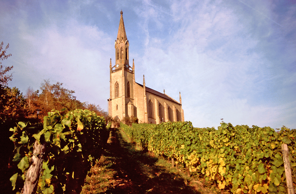 Waldböckelheim, Germany